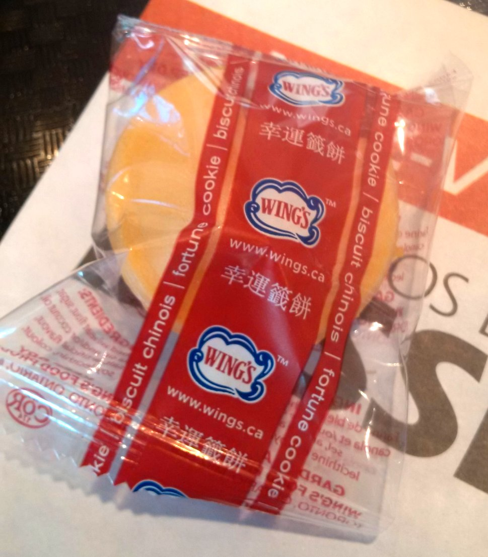 Biscuit chinois emballé tel que reçu dans un établissement de restauration rapide de la ville de Québec. Charlesbourg, Québec.